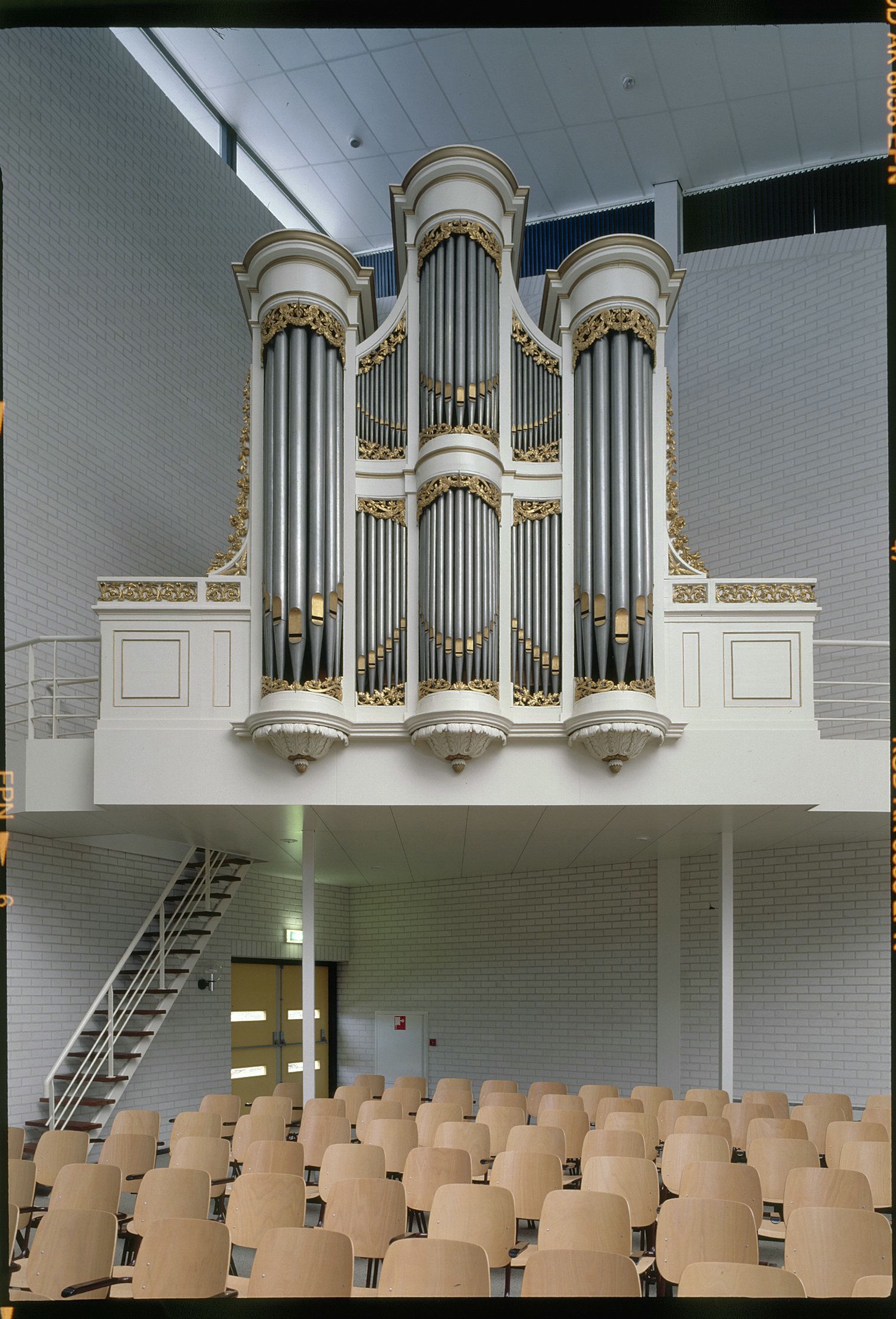 Gereformeerde kerk De Oase: Interieur, aanzicht orgel, orgelnummer 609 (opmerking: Gefotografeerd voor Het Historische Orgel in Nederland 1840-1849)